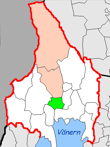 Var närradion täcker idag samt kommer täcka inom en snar framtid.